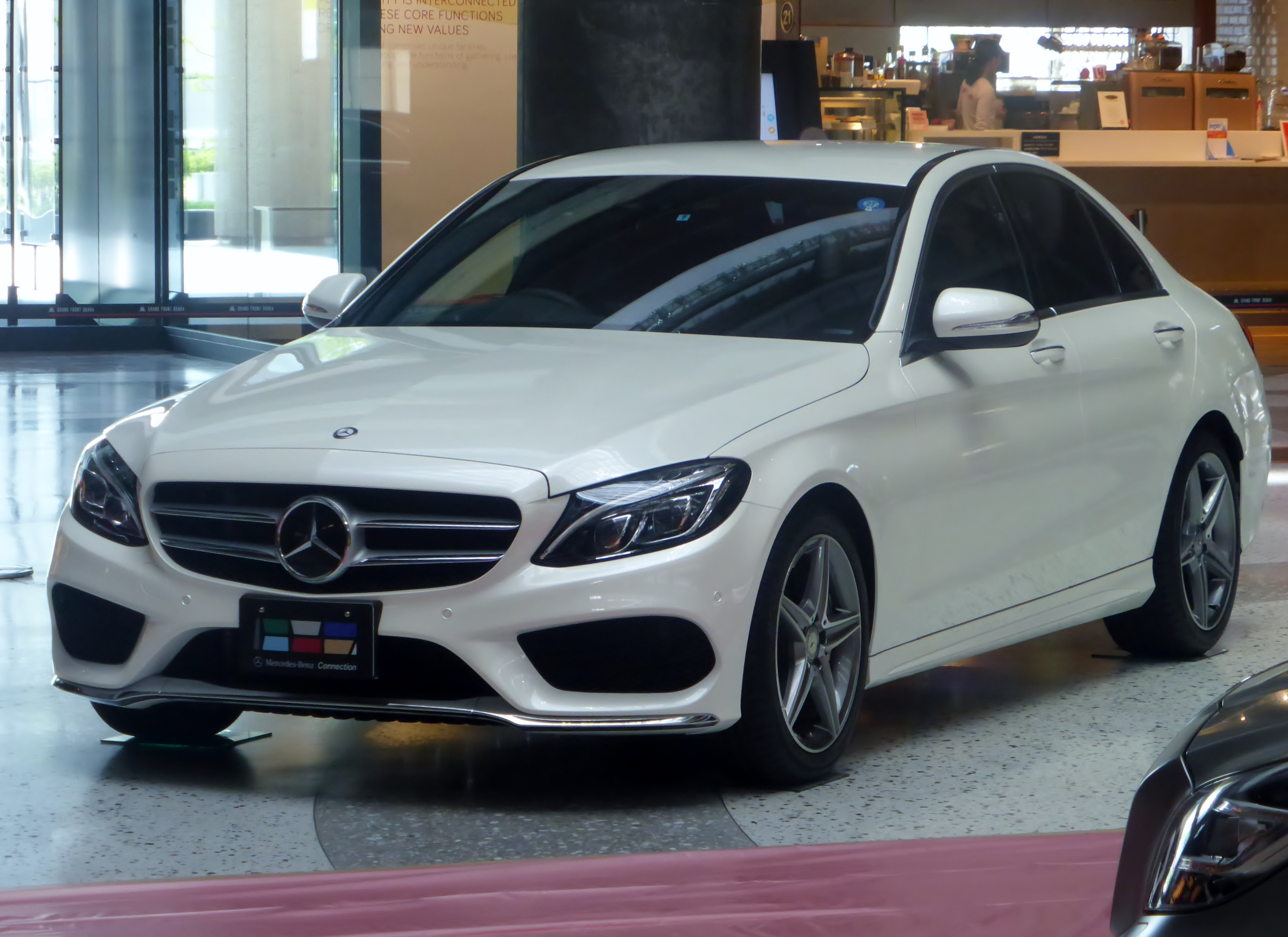 W205型メルセデス・ベンツC200アヴァンギャルドをフロントから撮影。